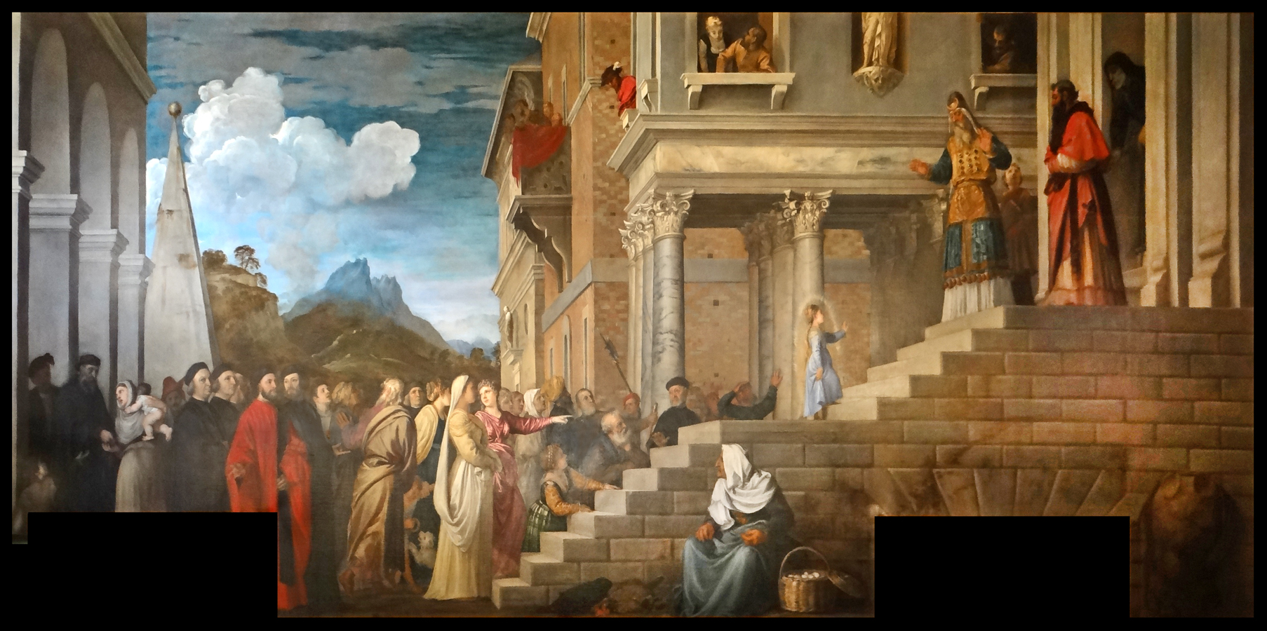 il torso antico visibile all’estrema destra e la vecchia venditrice di uova in primo piano rappresentano verosimilmente il paganesimo e la religione ebraica che precedettero l’era cristiana, mentre la piramide raffigurata sullo sfondo è un’allusione all’eternità della Vergine